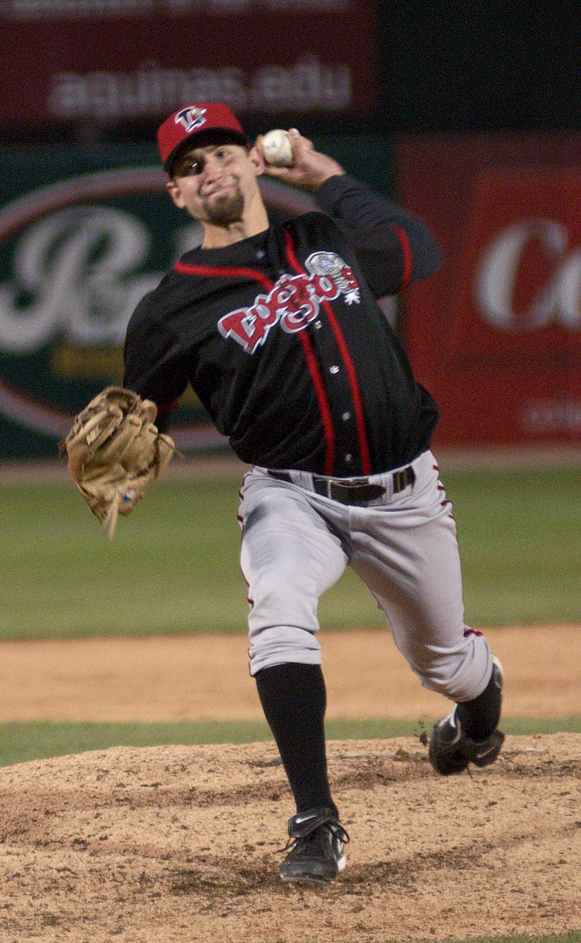 Evan Crawford